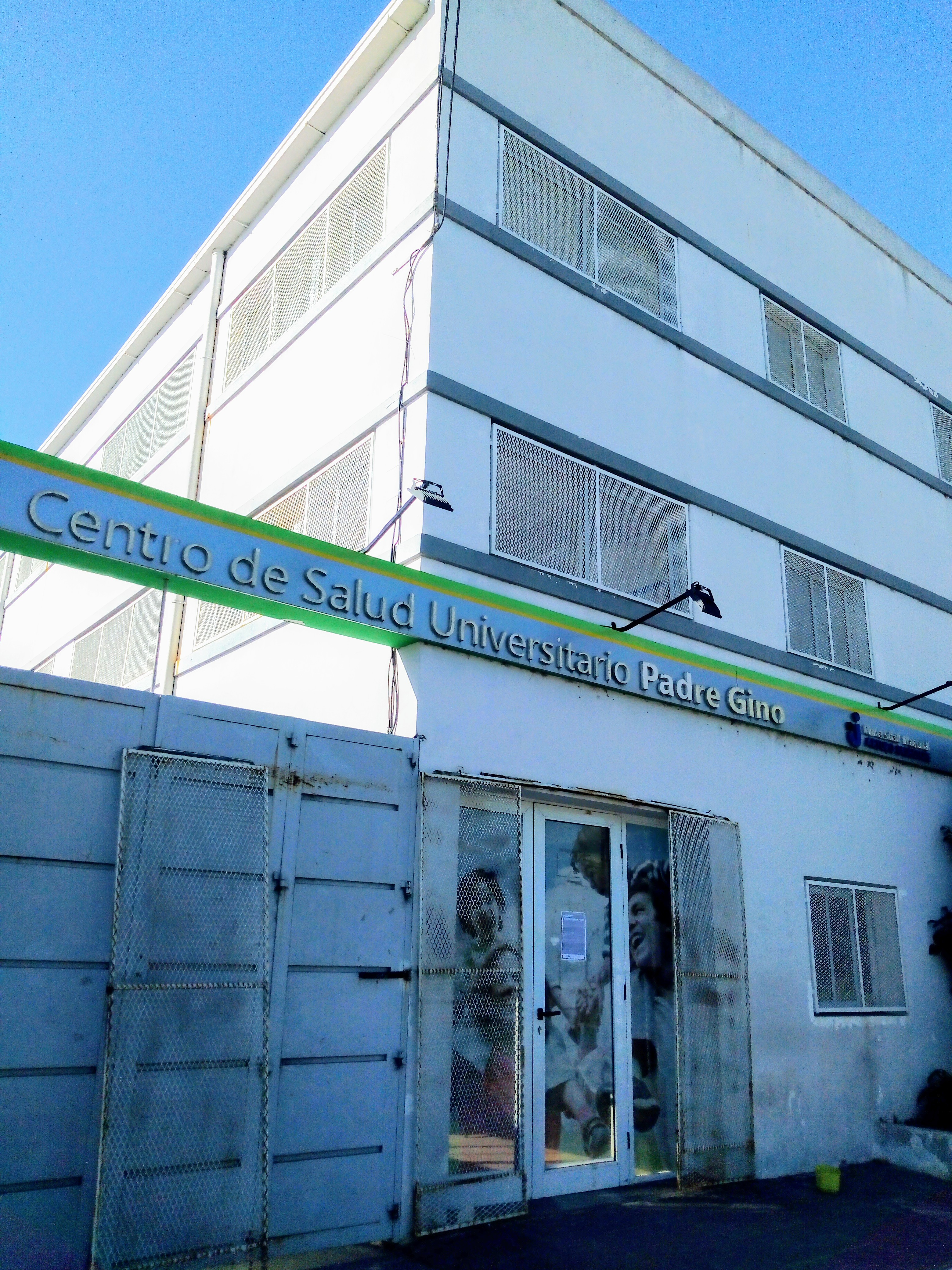 ntro Universitario Bosques corregida